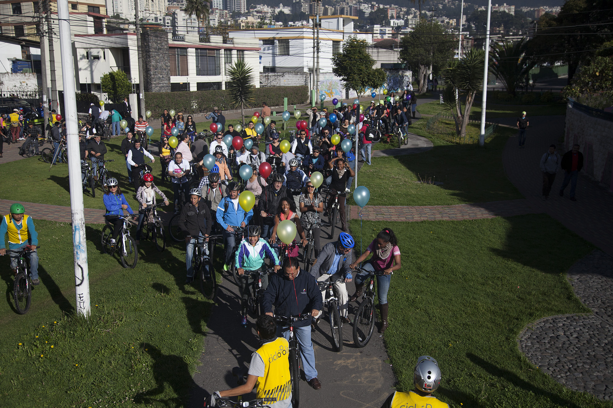 Grupo de ciclistas del Ministerio de Relaciones Exteriores del Ecuador, en el parque Isla Tortuga, de la parroquia Jipijapa en la ciudad de Quito.